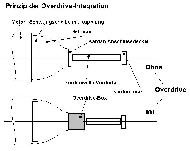 Overdrive, Prinzip-Layout